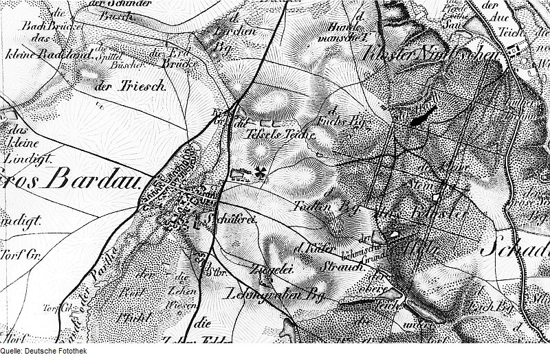 Original image description from the Deutsche Fotothek Großbardau. Oberreit, Sect. Leipzig, 1836/39